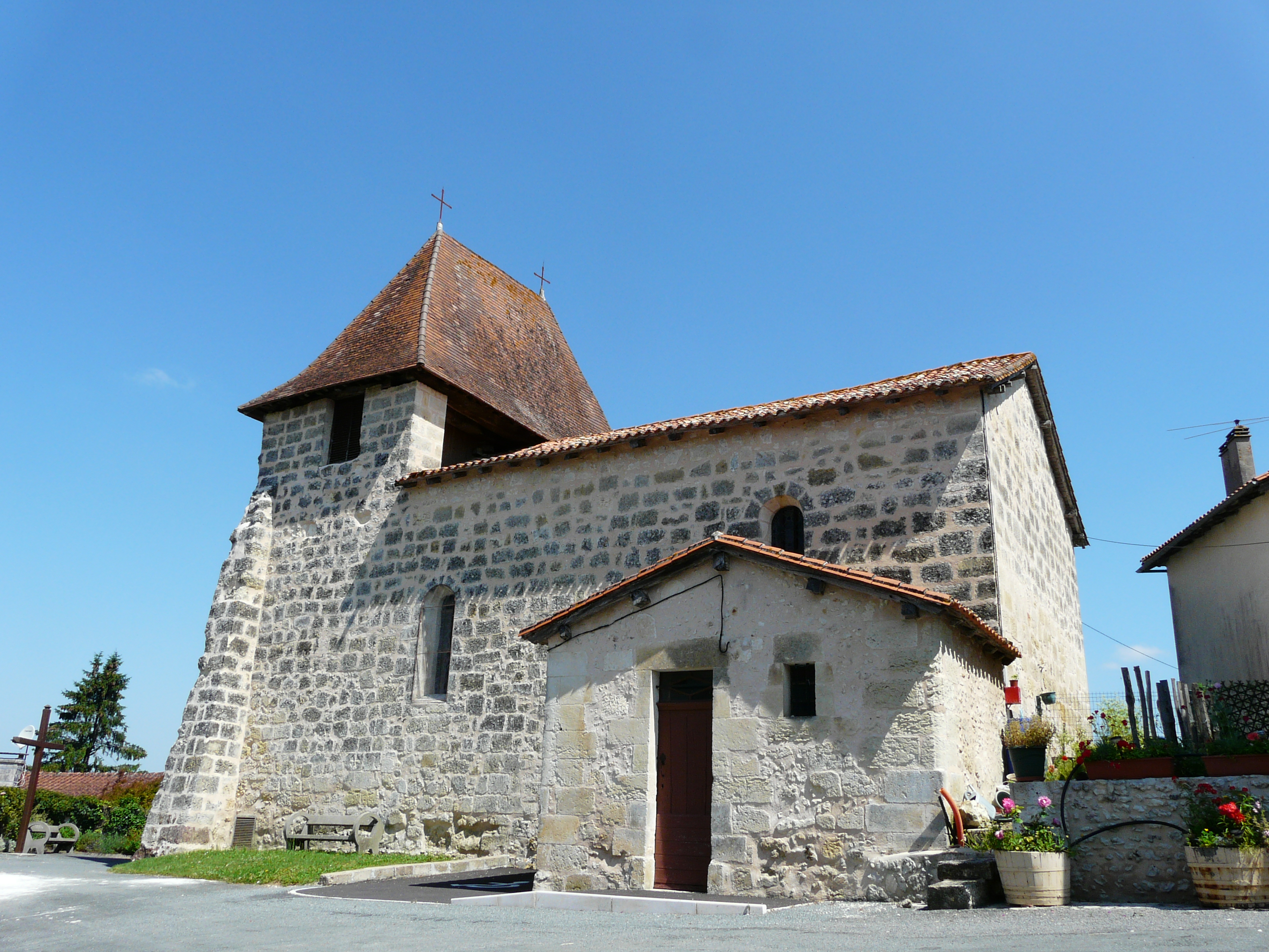 L'église Saint-Sulpice, Saint-Sulpice-de-Roumagnac, Dordogne, France.